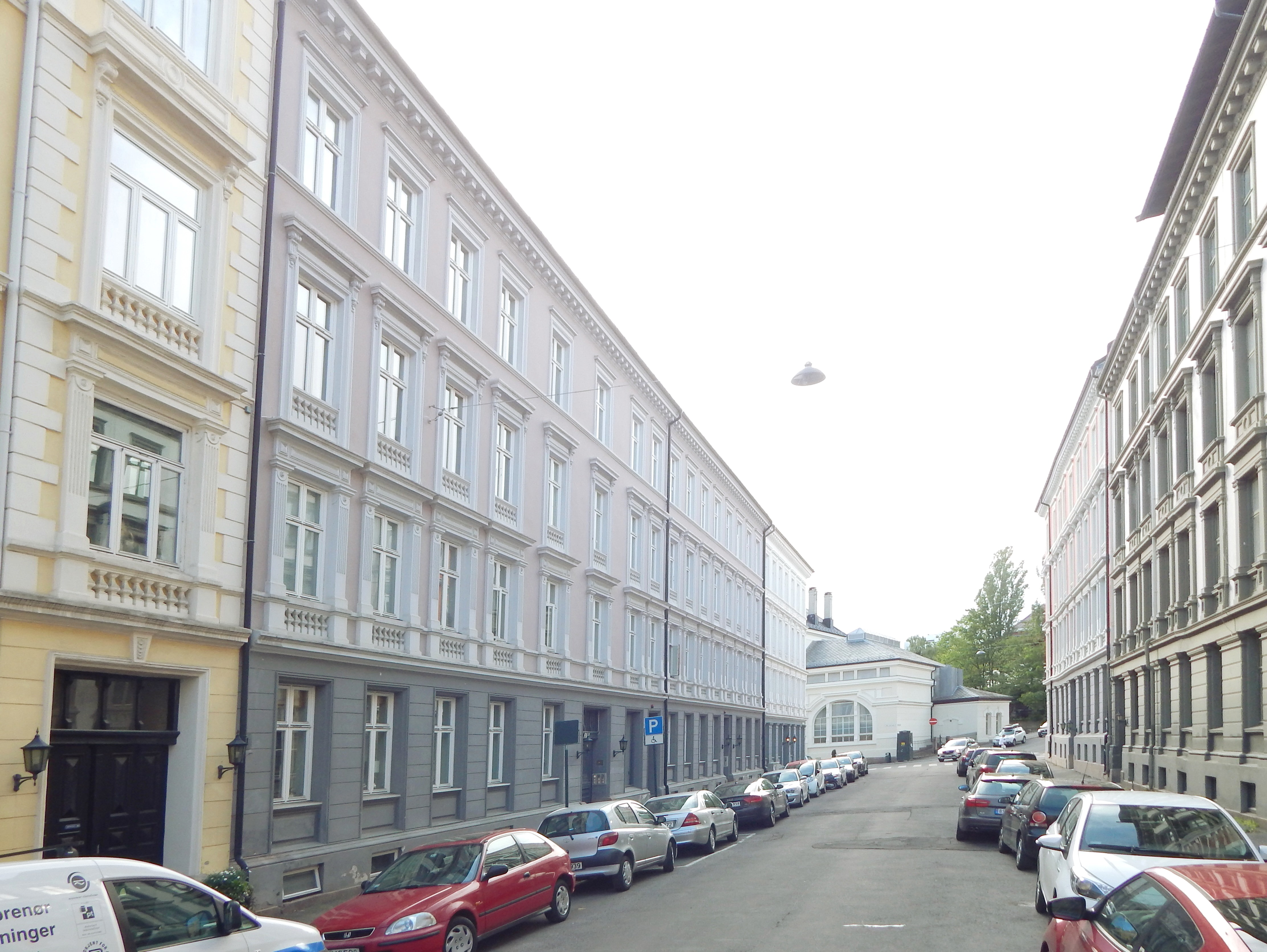 President Harbitz' gate ved nr. 2